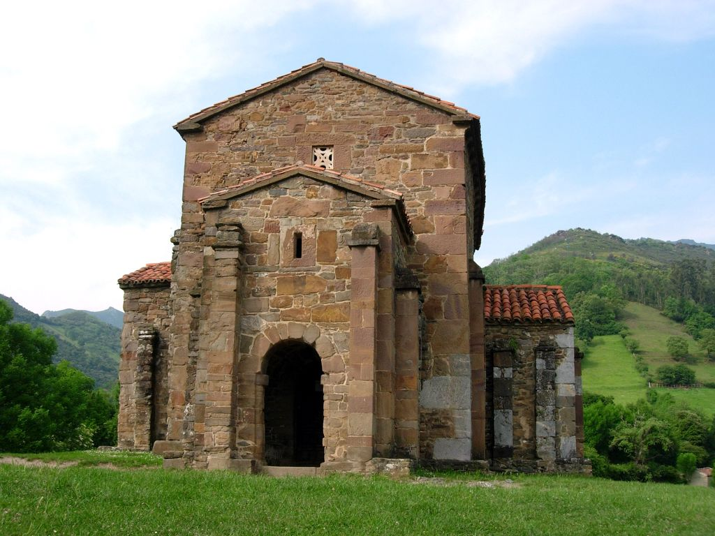 Iglesia de Santa Cristina de Lena